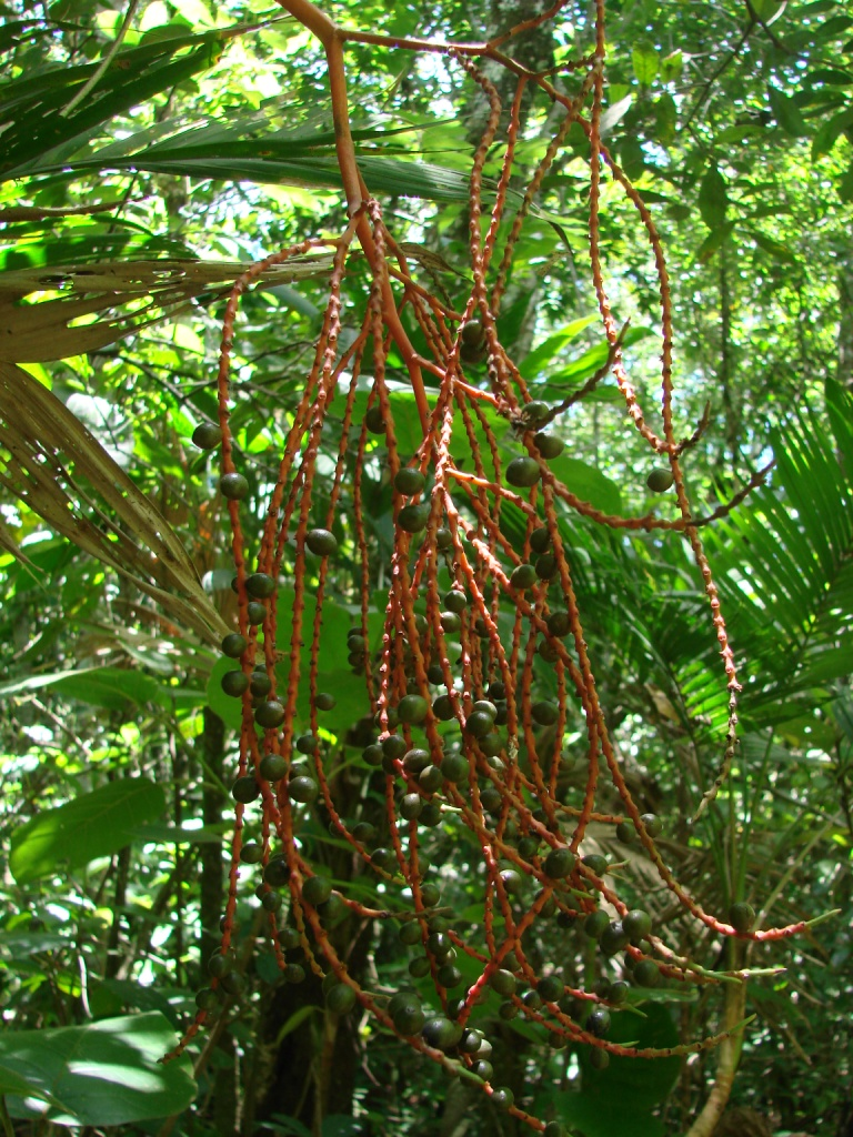 Geonoma brevispatha - ARECACEAE Estação Ecológica do IBGE - Brasília - Distrito Federal - Brasil.